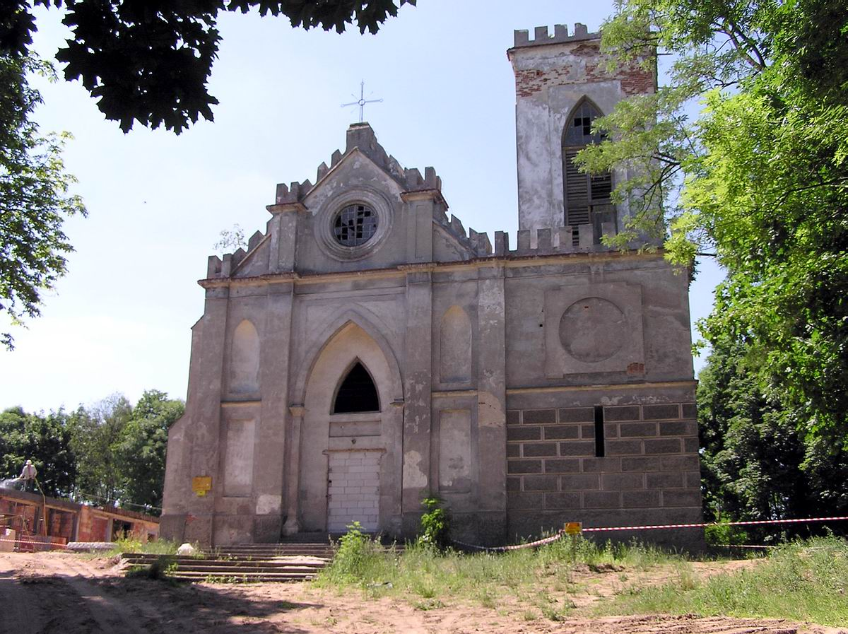 Gostynin, zamek przebudowany na kościół w trakcie przebudowy na zamek